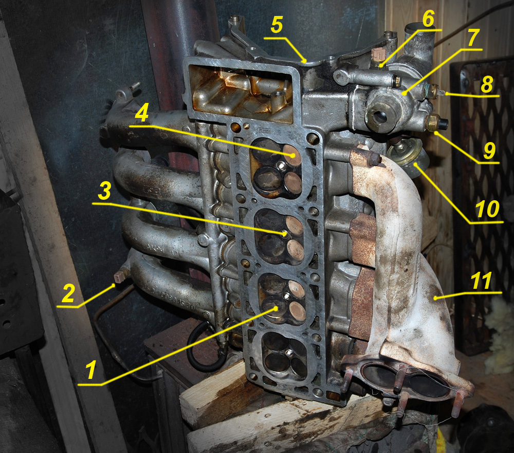 Головка блока цилиндров двигателя ЗМЗ-4062 автомобиля ГАЗ-3110-101 «Волга», вид снизу. 1 — впускной клапан, 2 — датчик температуры воздуха, 3 — свеча зажигания, 4 — выпускной клапан, 5 — место под распределительные валы, 6 — датчик температуры охлаждающей жидкости для микропроцессорной системы, 7 — термостат, 8 — аварийный датчик температуры ОЖ, 9 — датчик температуры ОЖ для стрелочного указателя, 10 — датчик давления масла, 11 — выпускной коллектор.